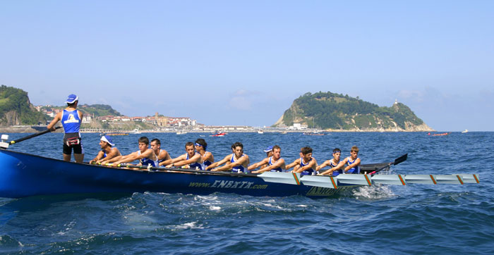 Trainière Enbata de Zarautz (Guipuzcoa - Pays basque - Espagne).